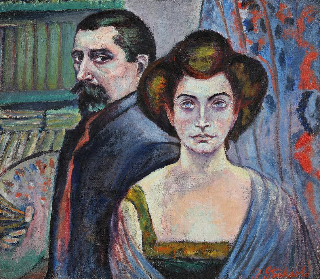 Stanislaus Stückgold: Selbstbildnis mit Gattin, um 1910. Öl auf Rupfen, signiert St. Stückgold, 60 x 69 cm